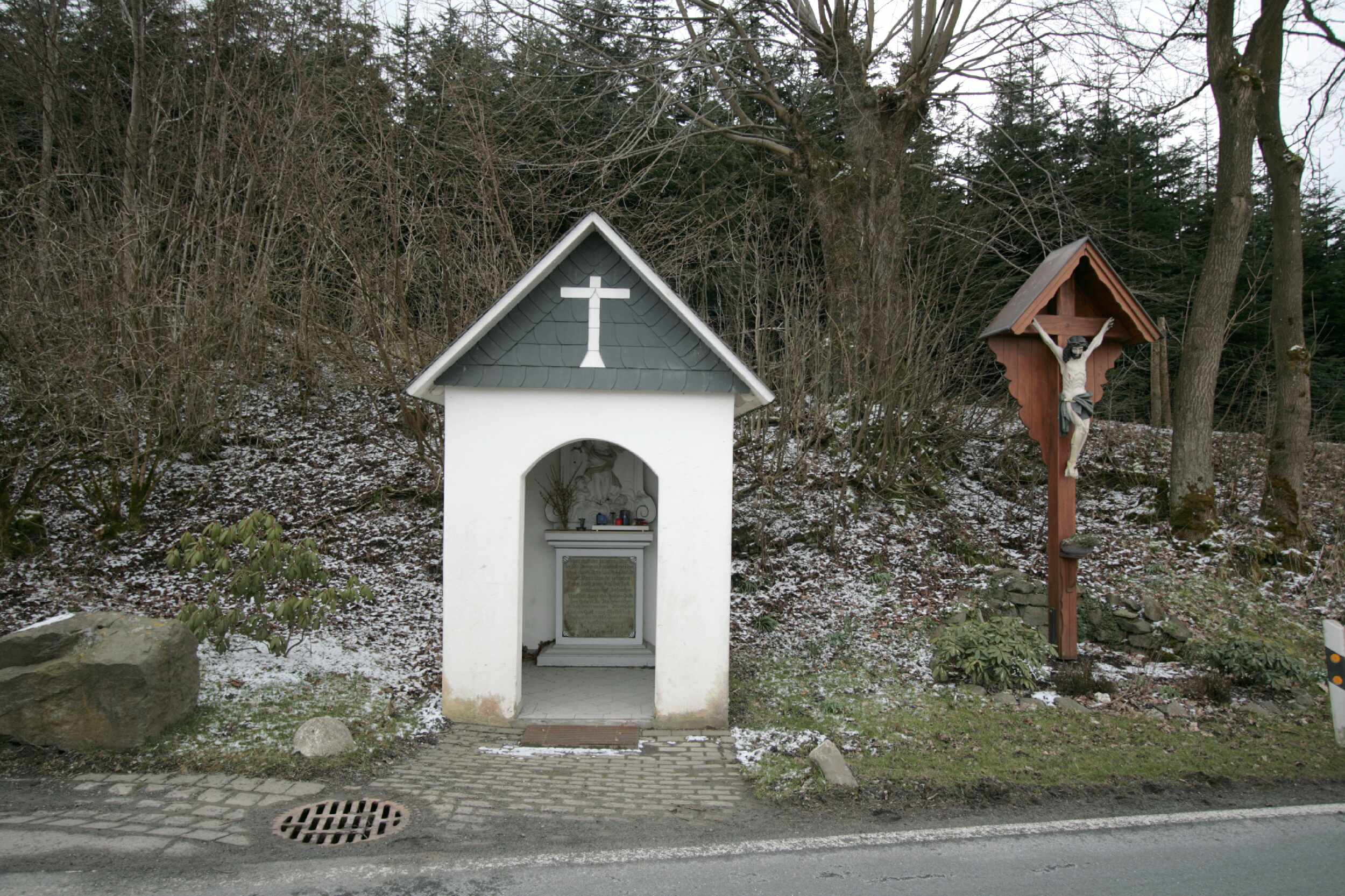 Bildstock an der Heidenstraße in Felbecke Richtung Wormbach